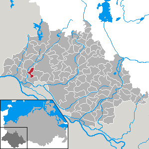 Tessin b. Boizenburg in Mecklenburg-Vorpommern - district Ludwigslust